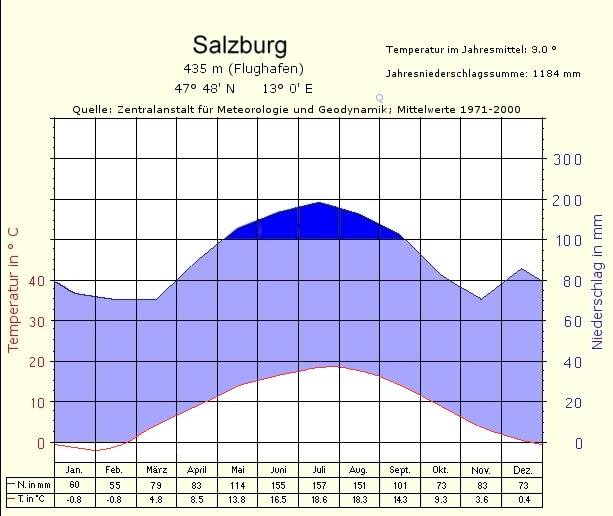 Klimadiagramm der Stadt Salzburg